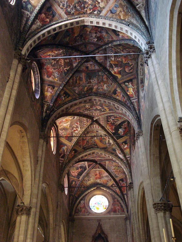 Pinturas do teto da Catedral de Arezzo